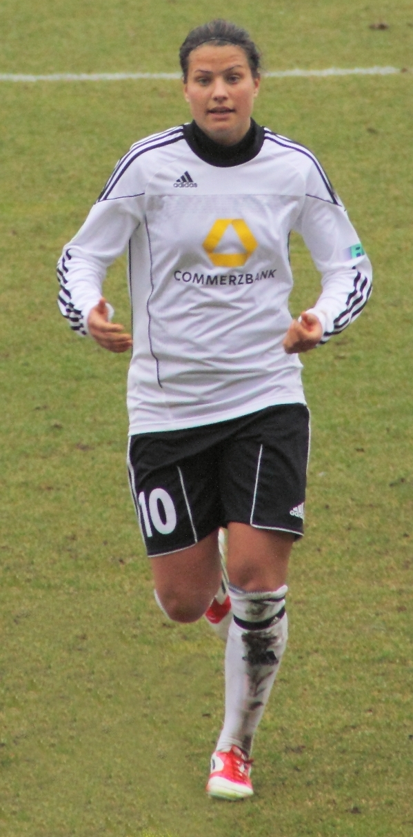 Dzsenifer Marozsán beim Spiel gegen den FF USV Jena im Ernst-Abbe-Sportfeld